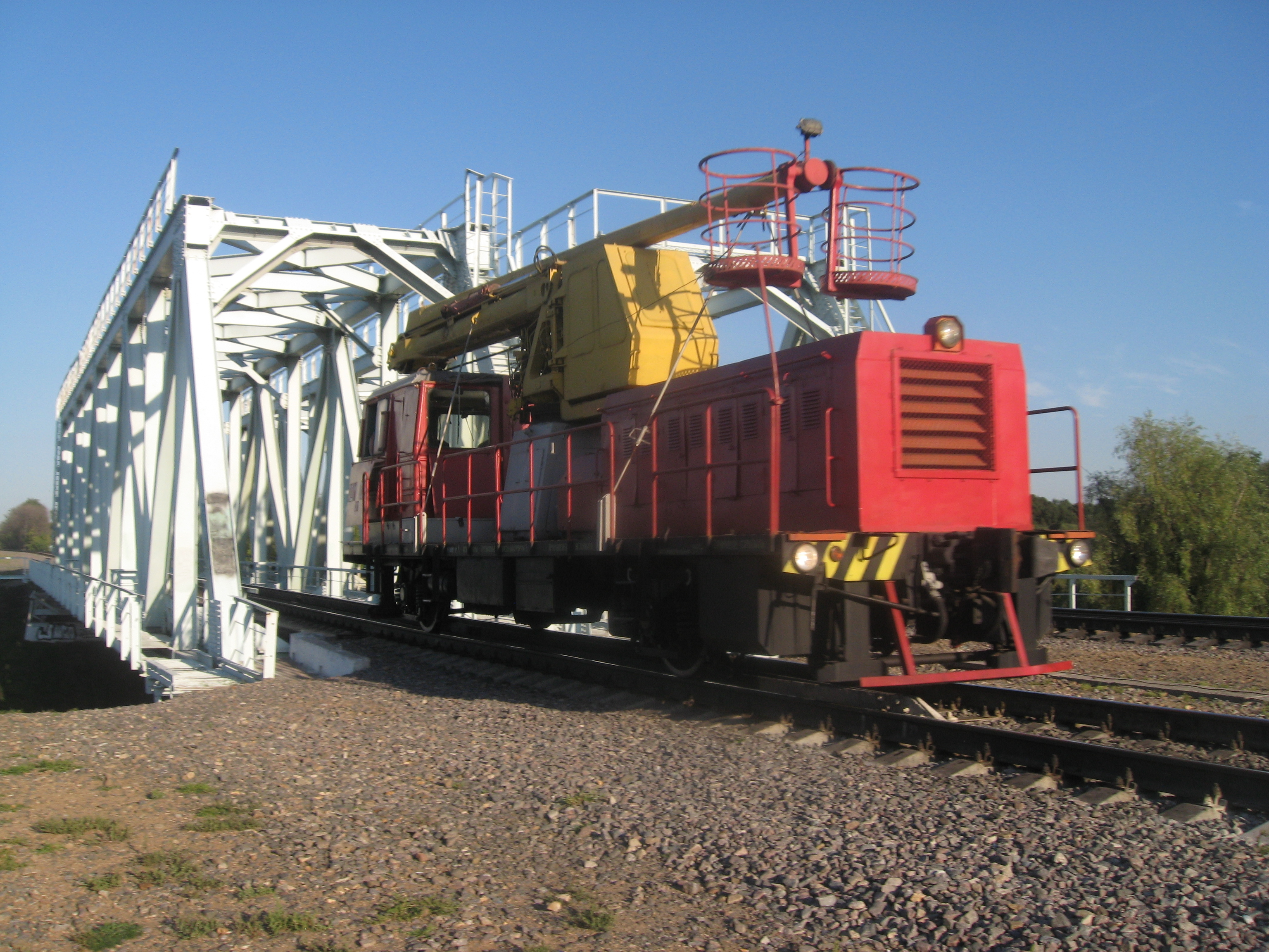 Дрезина АДМ на перегоне Владыкино–Ростокино Малого кольца МЖД